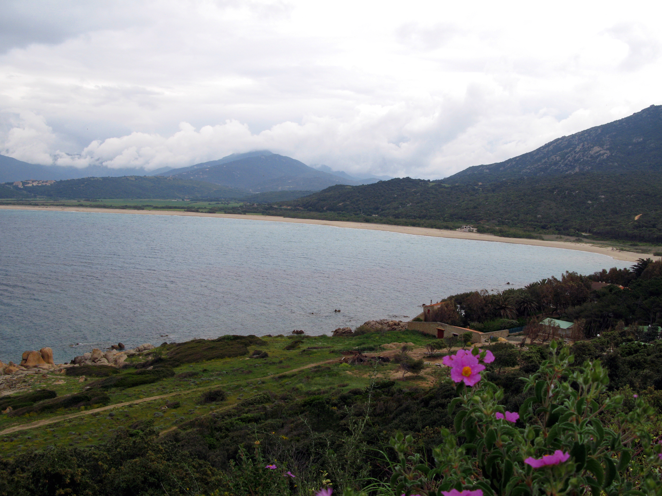 Propriano (Corse-du-Sud, France) La Plage de portigliolo dont une petite partie est sur la commune de Belvédère Campomoro, le reste étant sur la commune de Propriano